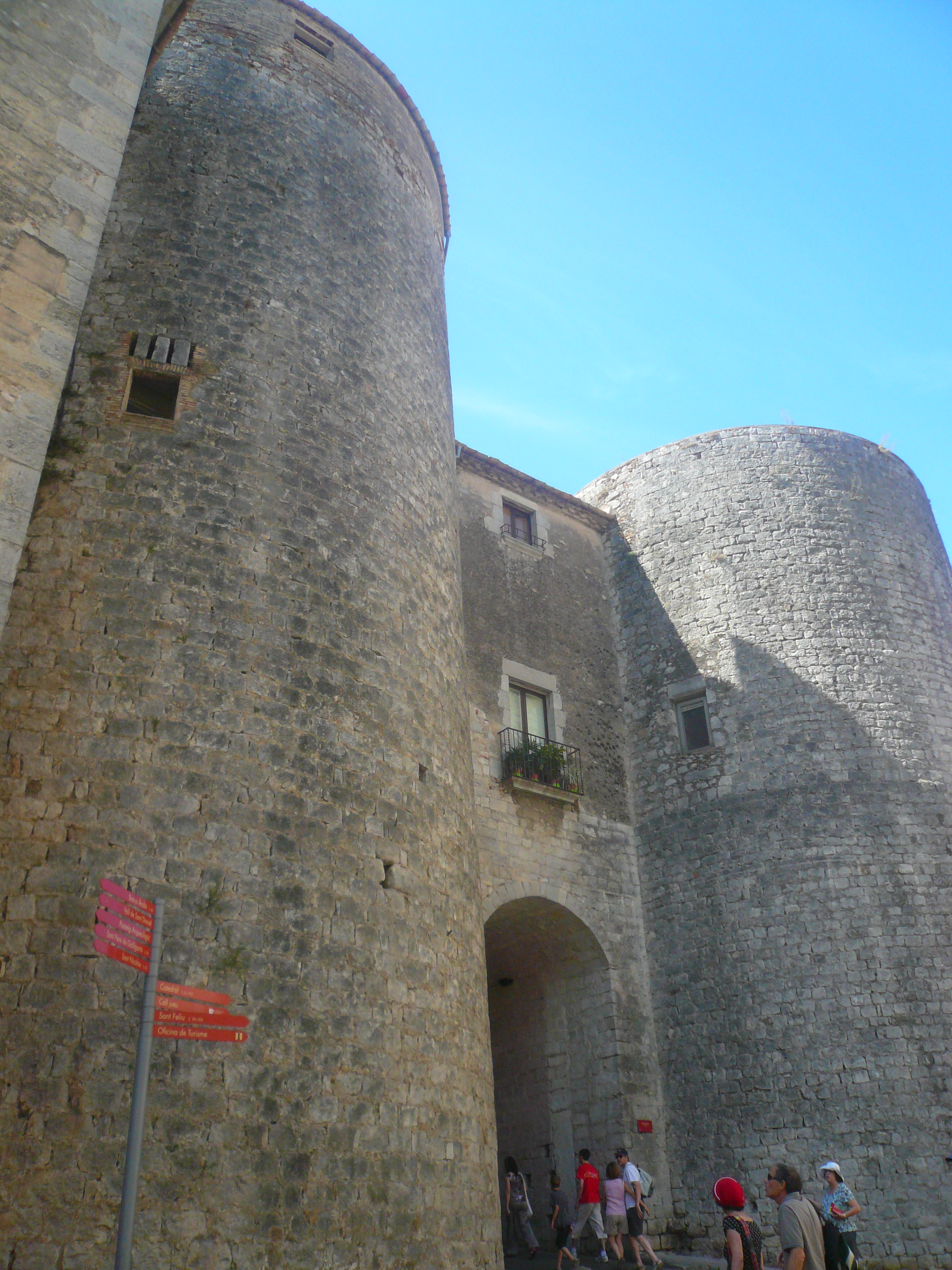 Muralles i portals (Girona) Object location41° 59′ 05.58″ N, 2° 49′ 43.76″ E